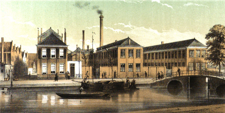 De Leidsche Katoenmaatschappij N.V. voorheen De Heyder & Co. Illustratie gemaakt door Gerardus Johannes Bos voor het album De Stad Leiden : Album bevattende eenige afbeeldingen der voornaamste hoofdgebouwen en fraaiste gezigten in en nabij de stad Leiden. eerste Serie. Auteur: A Montagne; G J Bos; Uitgever: Leiden Couvée (1859).